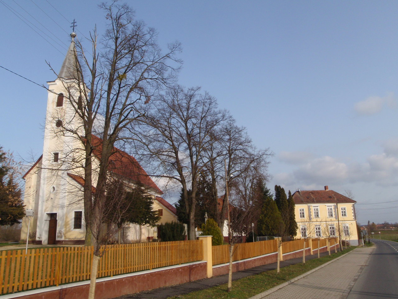 Vasalja faluközpont - Pinkaszentkirály falurész